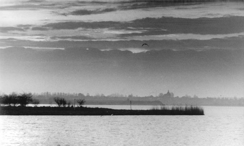 Blick über den Dassower See Zum Beitrag: Heringstörn von Dassow nach Travemunde- Wie DDR-Fischer in diesem Frühling Marktwirtschaft praktizieren. ADN-ZB Sindermann - 26.3.1990 - Ein fischreicher Naturschutzgebiet ist der Dassower See, der mit der Pötenitzer Wiek verbunden ist und in der Lübecker Bucht der Ostsee mündet. Seit mehr als achthundertJahre besaßen hier die Lübecker, Dassower und eien paar andere Fischerhamilien das verbriefte Racht zum Fischfang - bis für die siebzehn eingetragenen Dassower Fischer mit Grenzsicherungsmaßnahmen 1961 dafür das "Aus" kam. In diesem Frühjahr gehen sie nun zum erstenmal seit 28 Jahren wieder auf dem See "vor der Haustür" auf Herignsgang. (Hierzu gehören die Fotos 1990-0236-300N-305N)